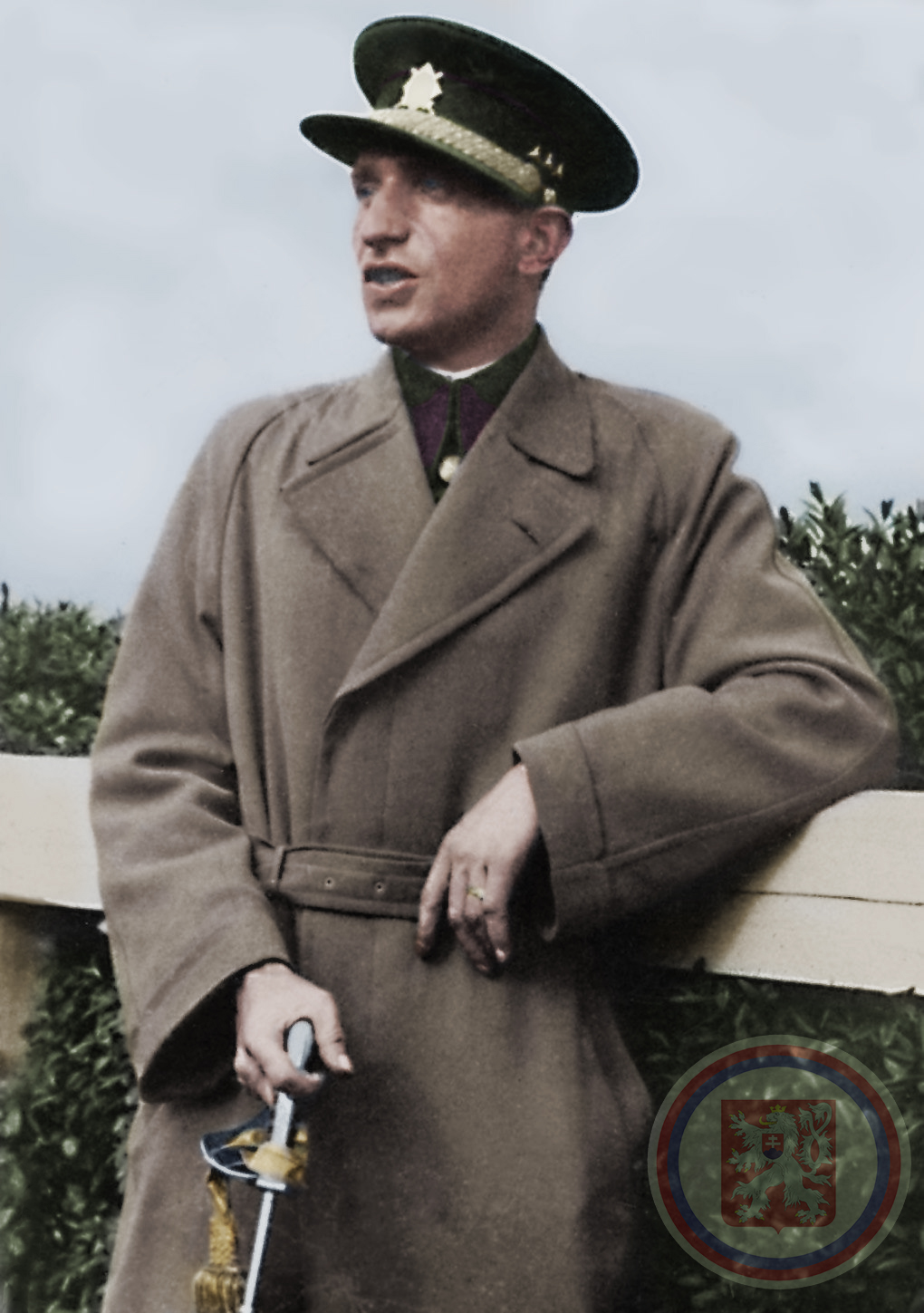 Václav Morávek na jedné ze svých mnoha fotografií, kolorováno